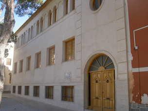 Albergue - hospedería para los romeros que visitan San Pascual, en Orito (Monforte del Cid, Alicante)